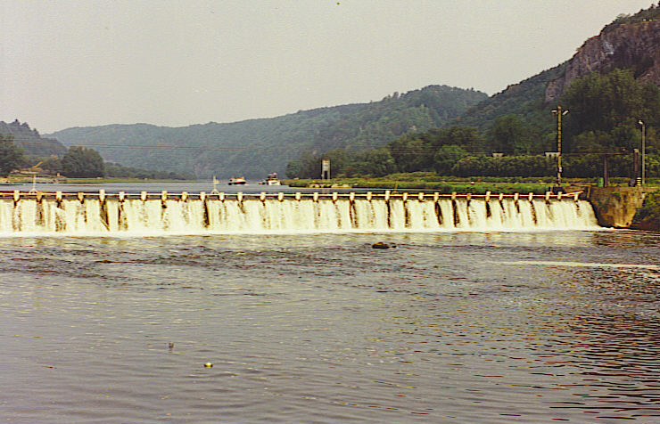 self made